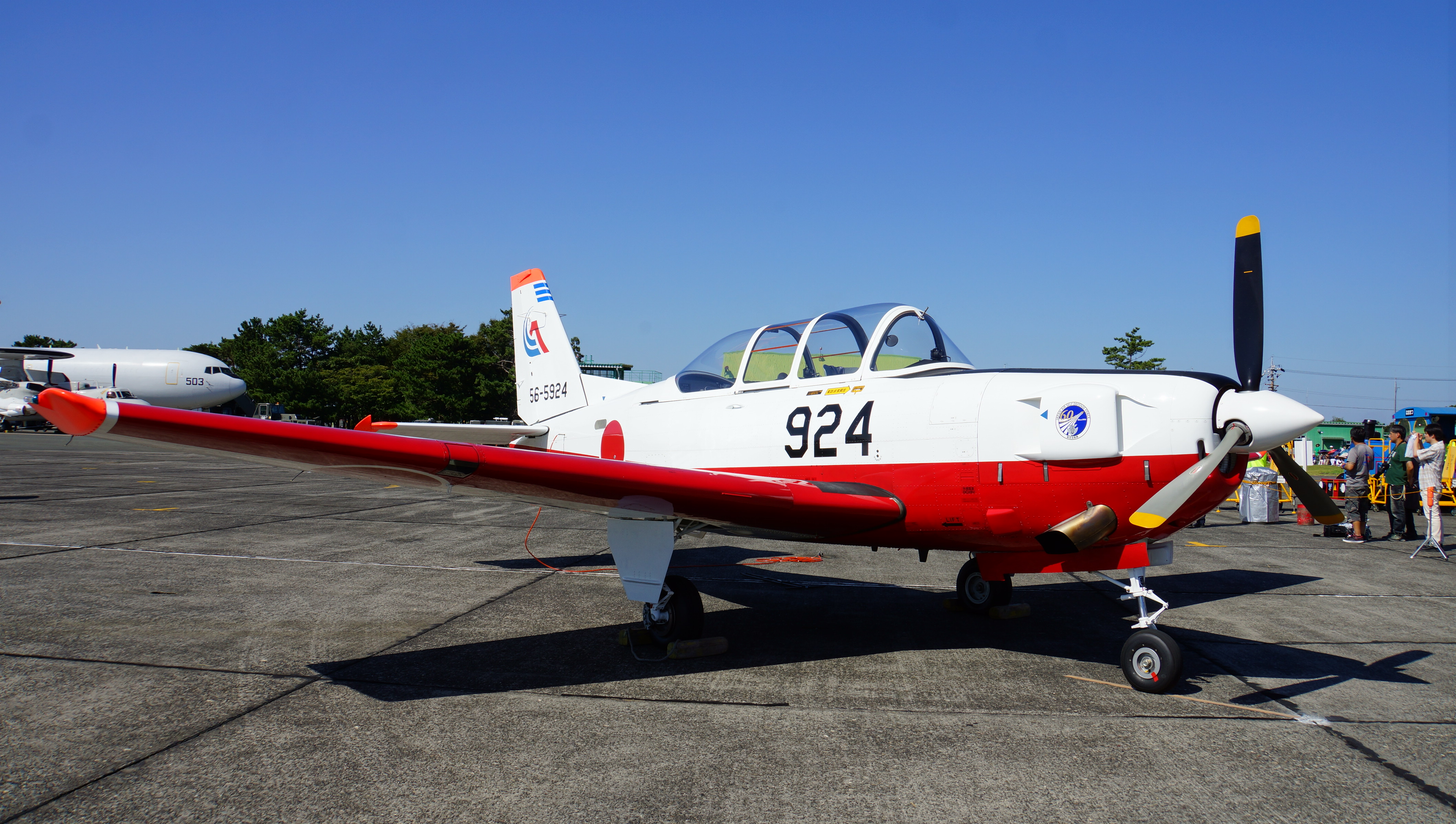 航空自衛隊 T-7初等練習機（56-5924号機）。 14年9月28日 浜松基地にて。